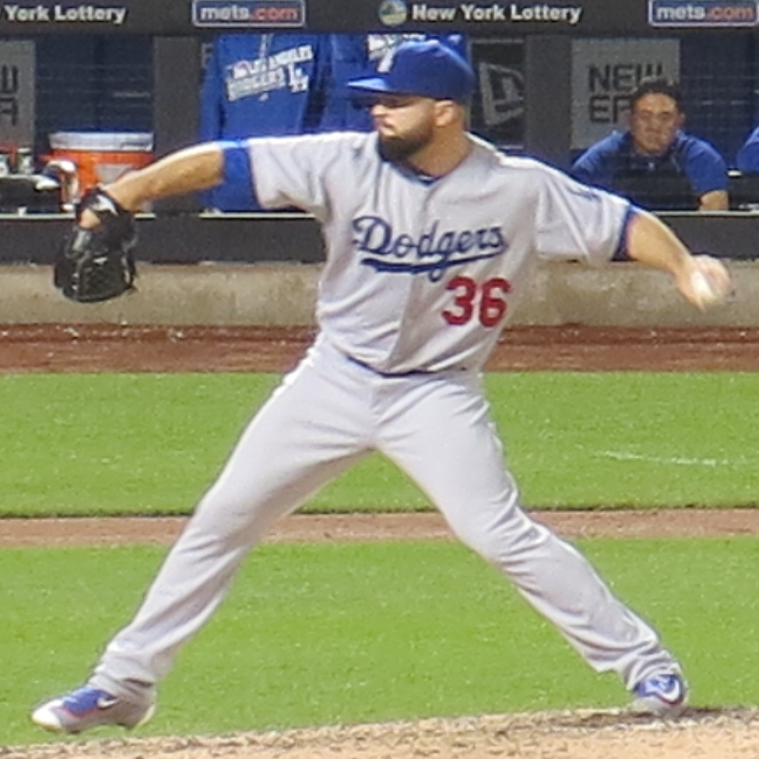 Adam Liberatore